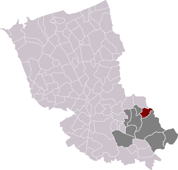 Locatie gemeente Sint-Janskappel in arrondissement Duinkerke. Zelfgemaakt. Location of Saint-Jans-Cappel municipality in the arrondissement of Dunkirk. Self made. Localisation de la commune de Saint-Jans-Cappel dans l'arrondissement de Dunkerque. Fait moi-même.